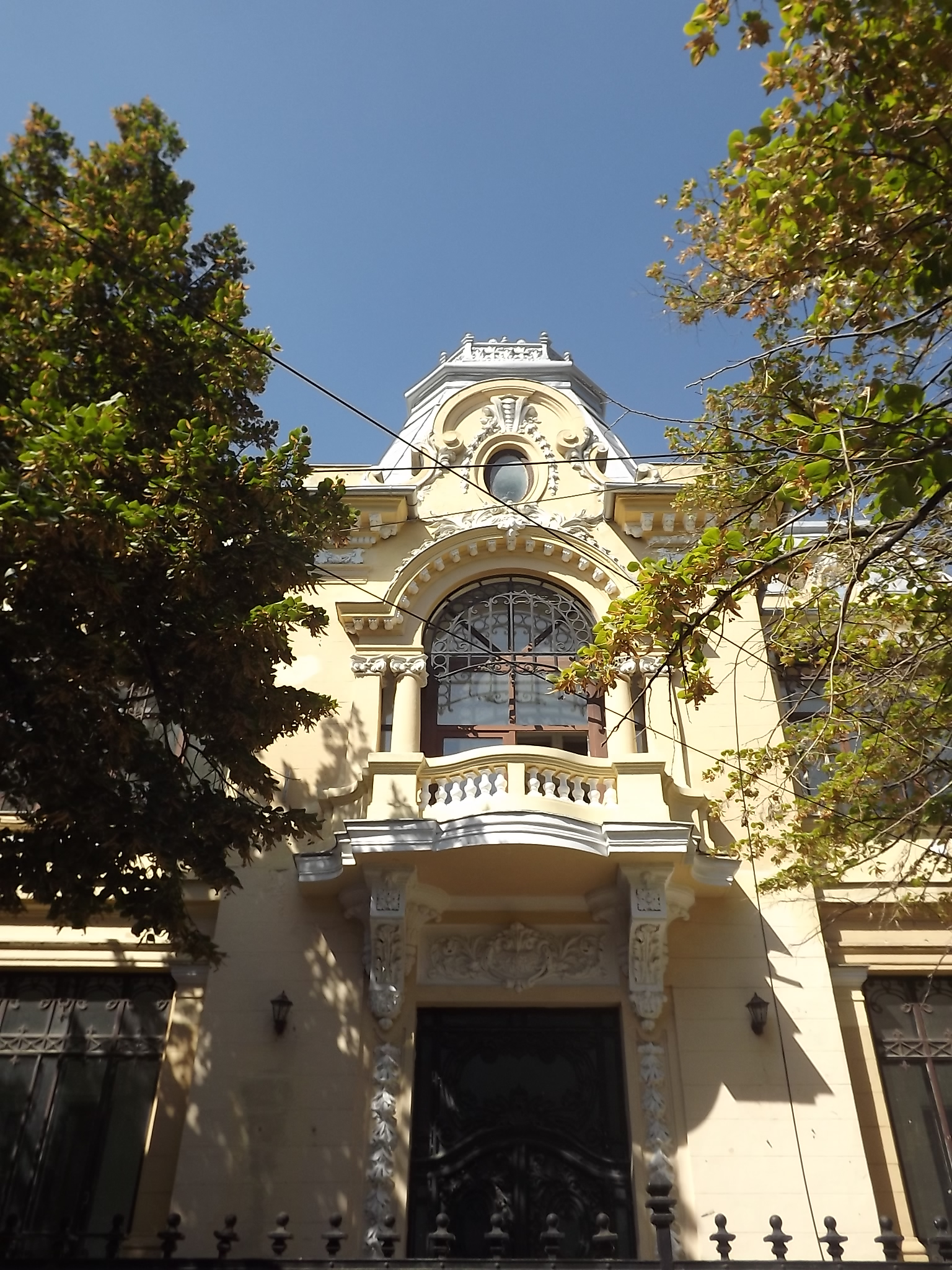 Casă, azi Comisia Zonei Montane